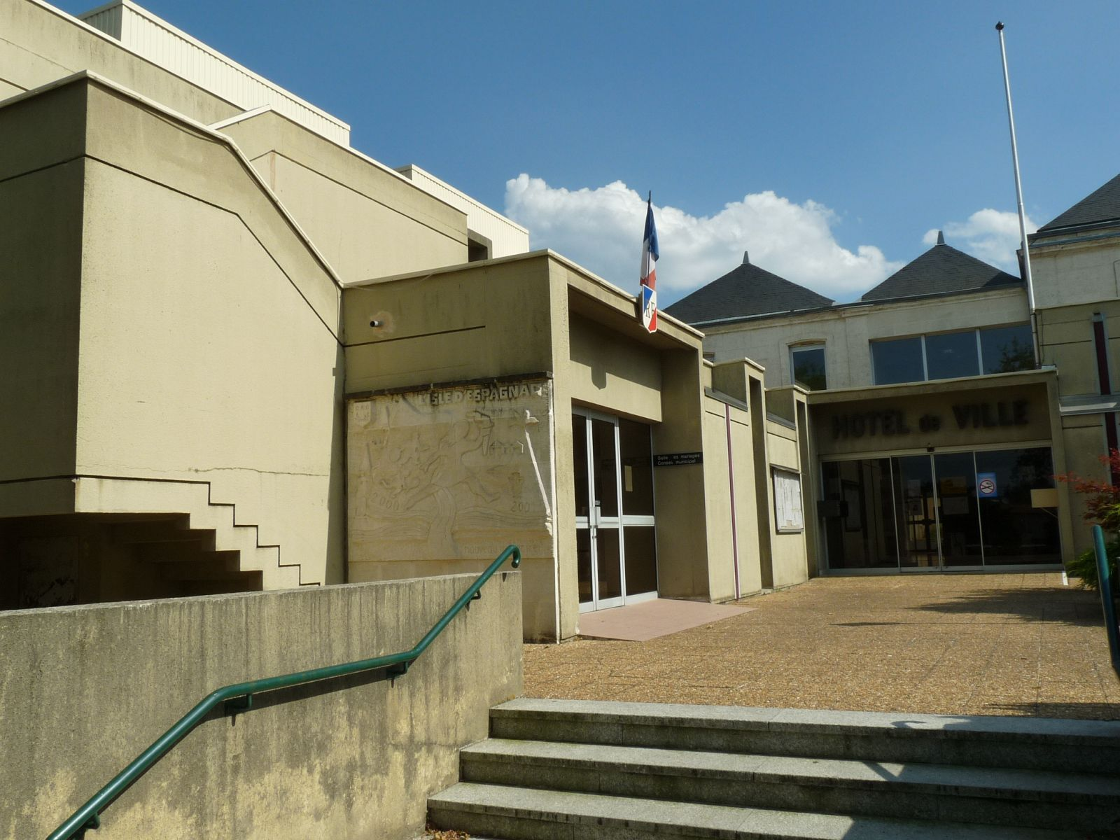 mairie de l'Isle-d'Espagnac (16), France